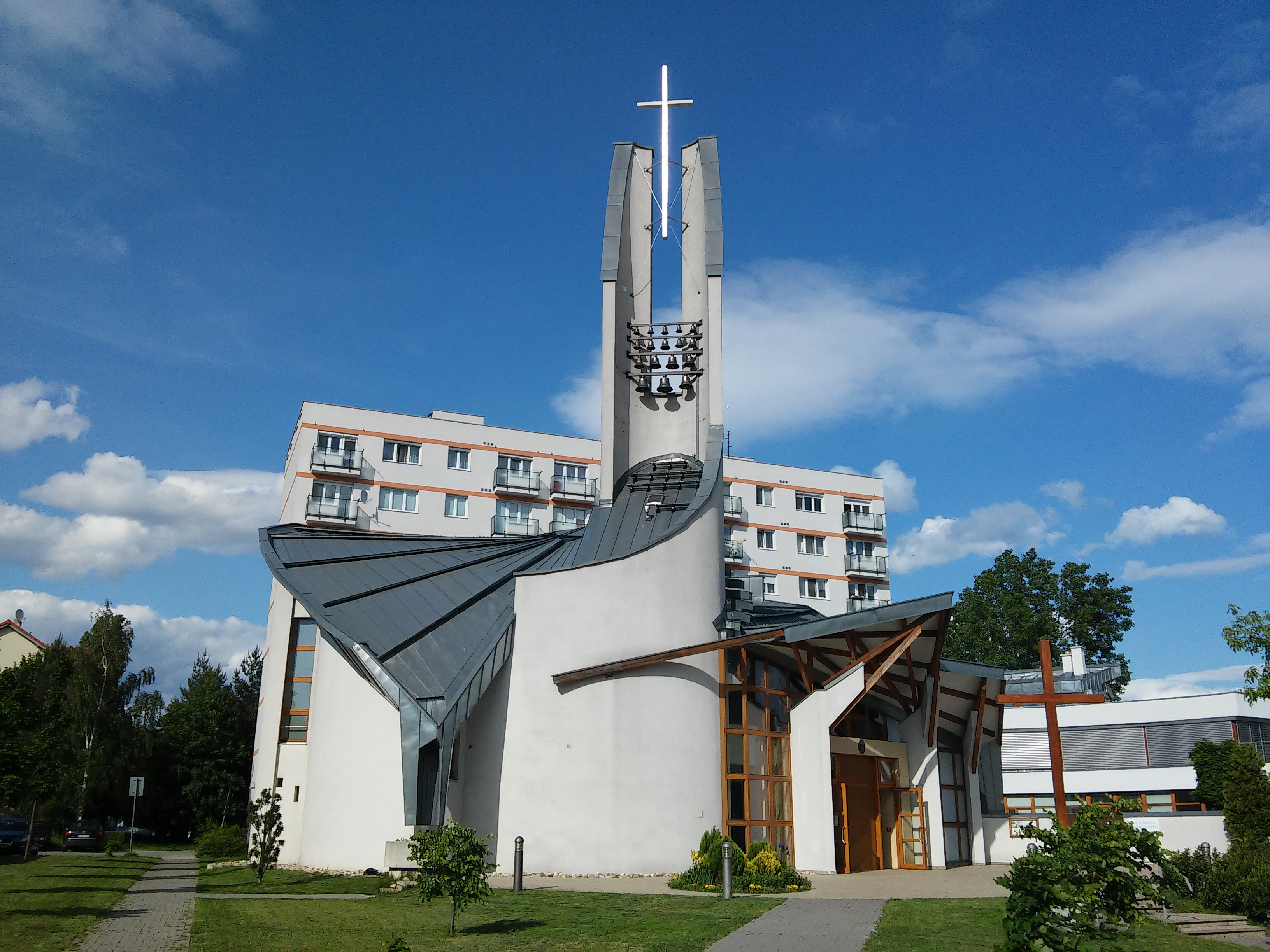 Katedrála svätého Šebastiána, Bratislava - Rača